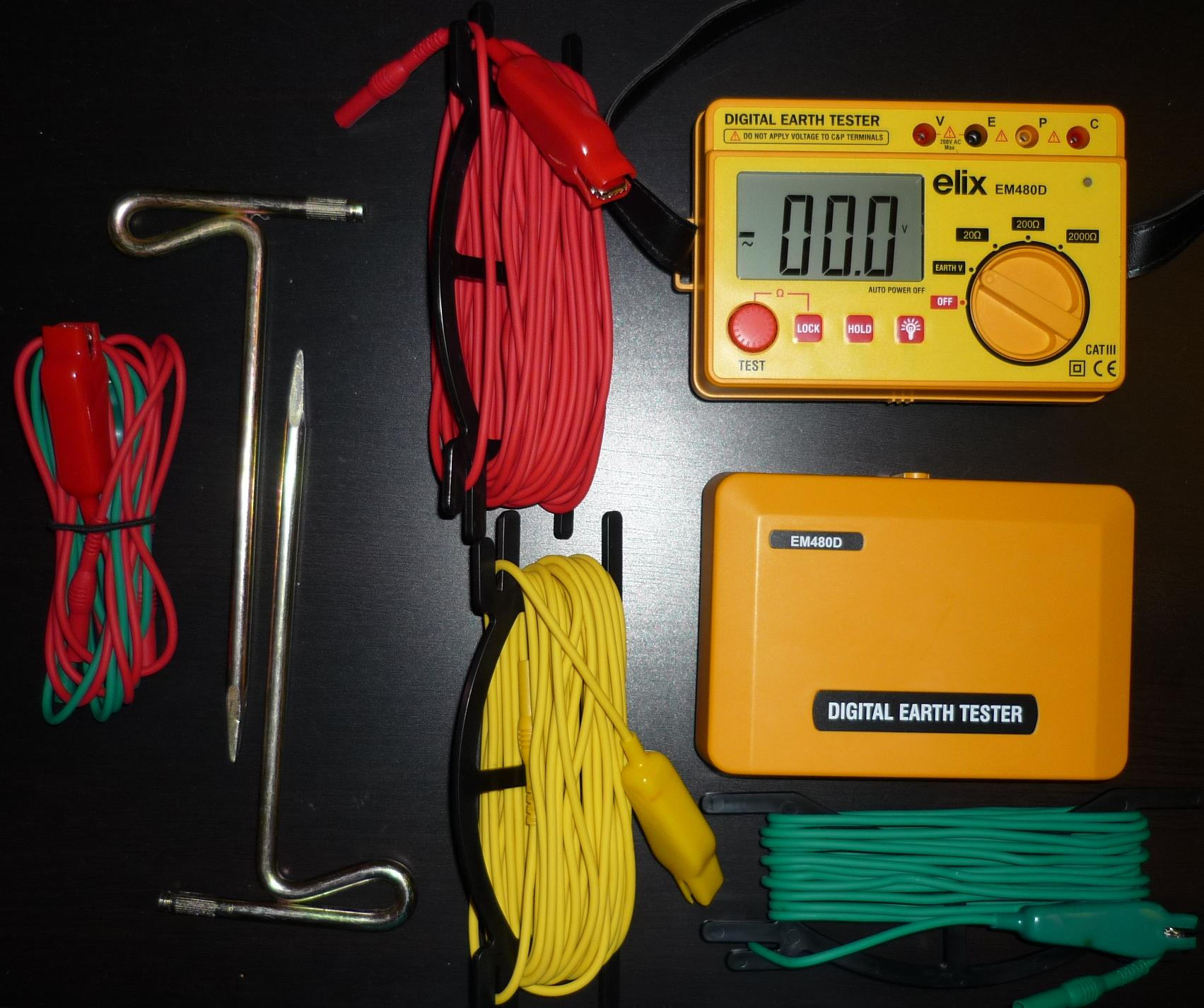 Telluometre